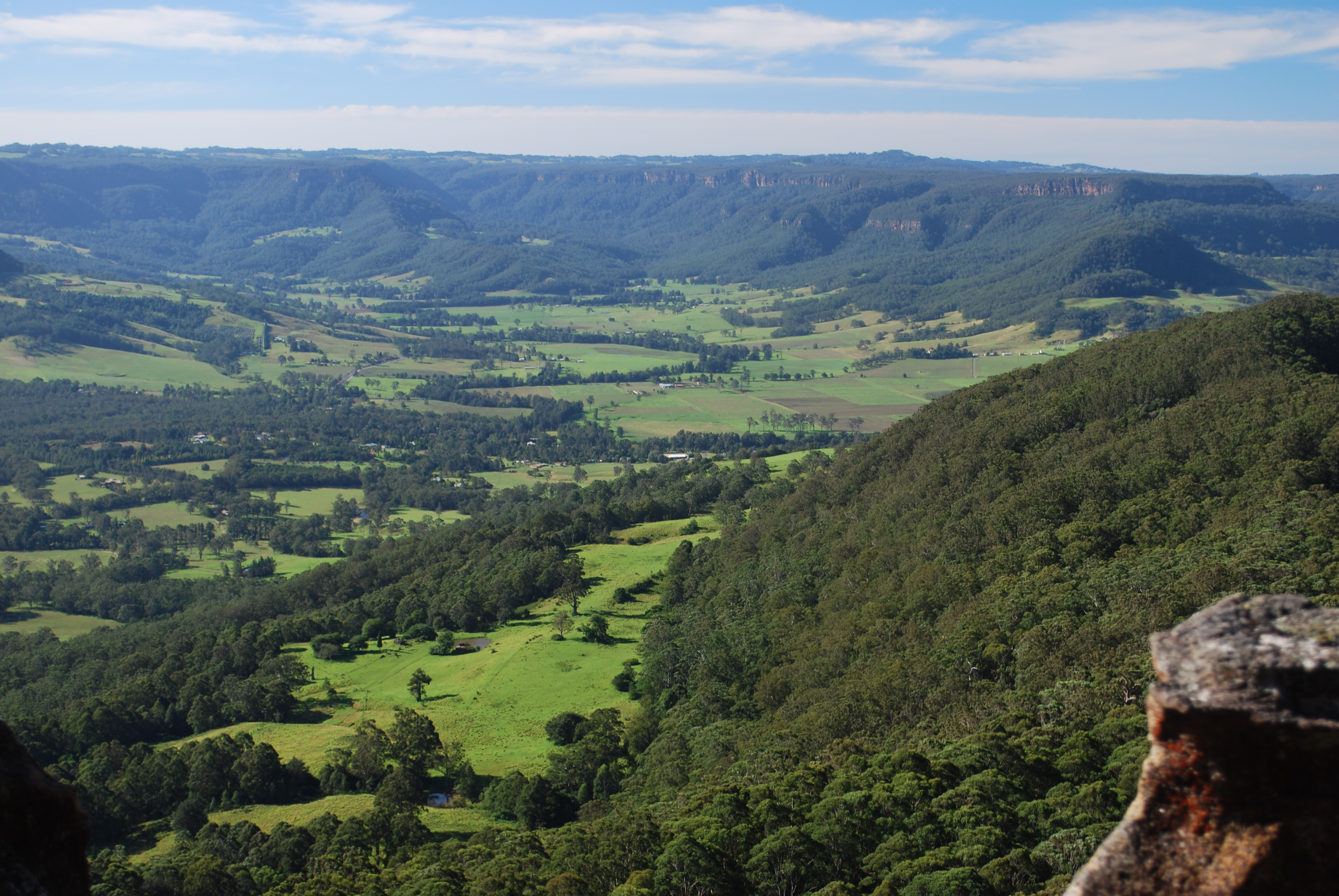 My Favourite Valley